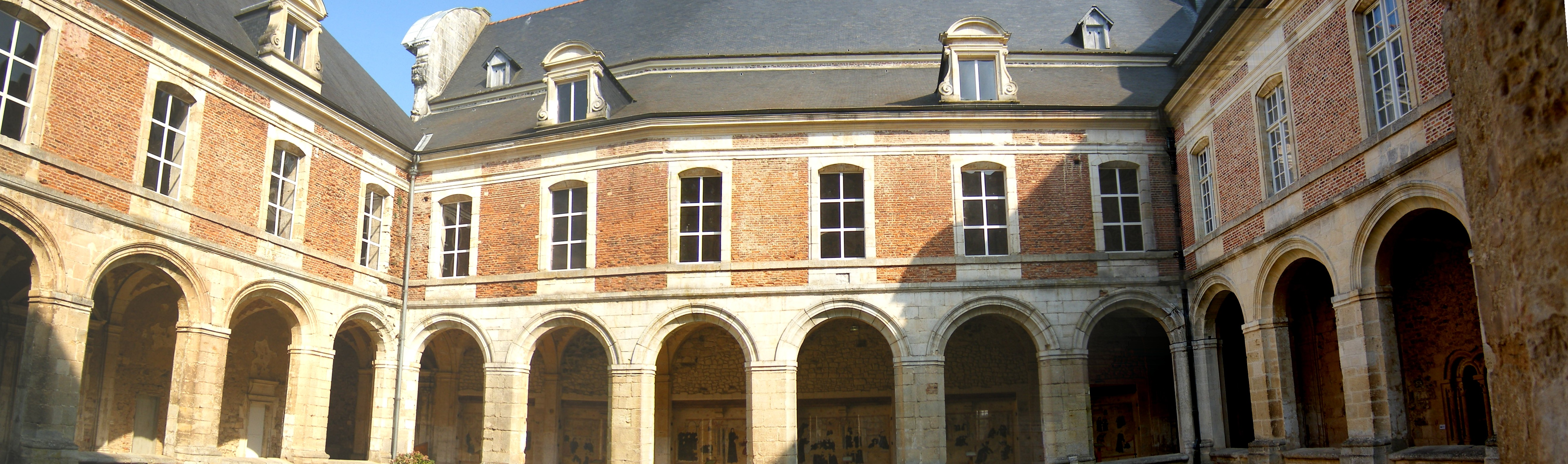 Abbaye de Saint-Michel en Thiérache - Cloître